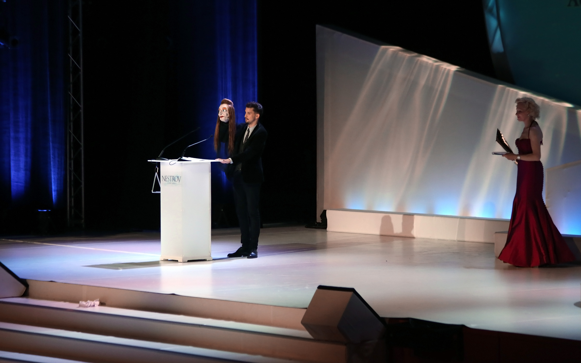 Elfriede Jelineks Rede als Preisträgerin (Bestes Stück – Autorenpreis), zuvor aufgezeichnet, wird von Nikolaus Habjan mit der Elfriede-Jelinek-Handpuppe aus „Schatten (Eurydike sagt)“ vorgetragen, rechts Moderatorin Sunnyi|Melles - Nestroy-Theaterpreis 2013 in der Halle F der Wiener Stadthalle (Wien, Österreich).